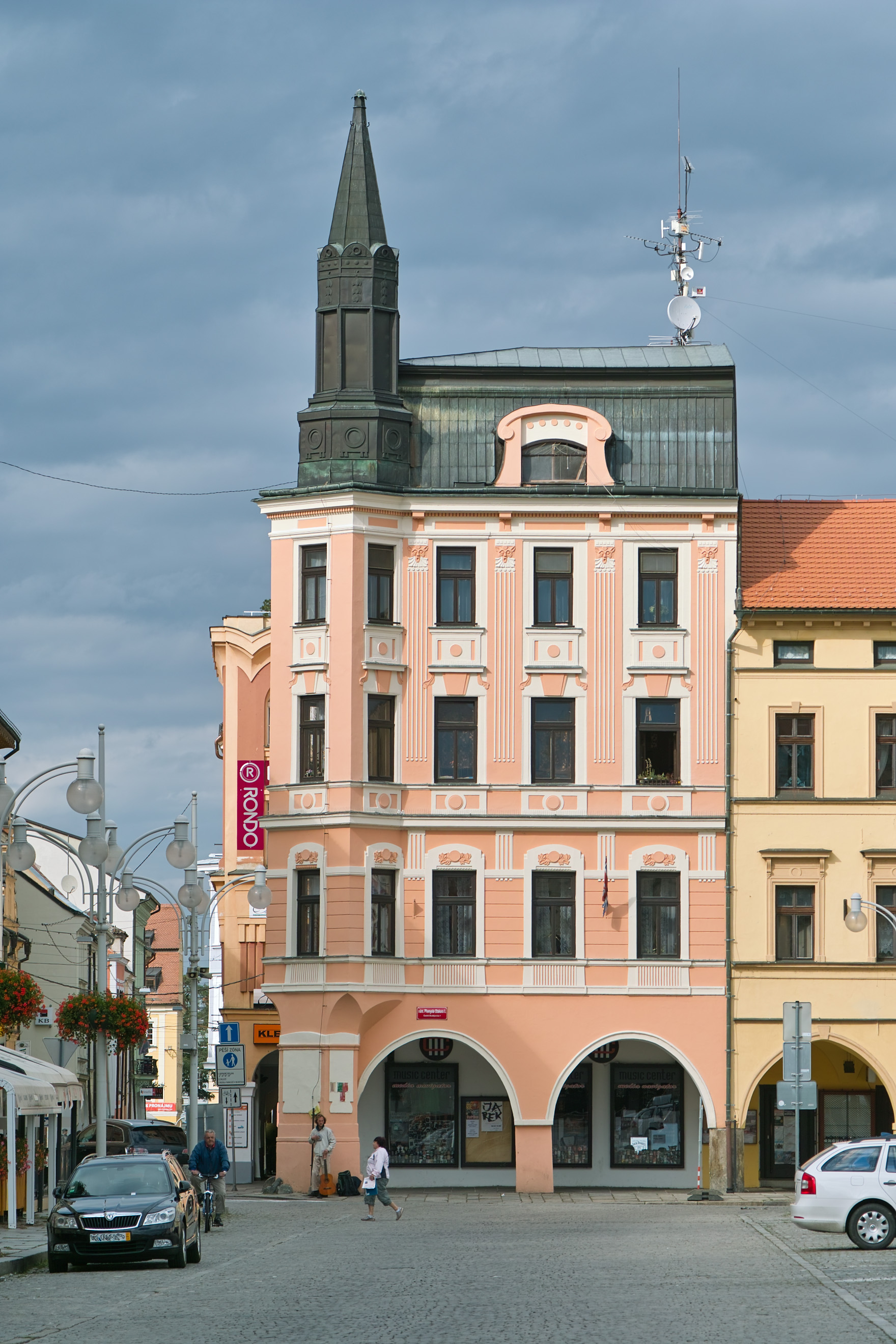 Puklicův dům, náměstí Přemysla Otakara II, České Budějovice